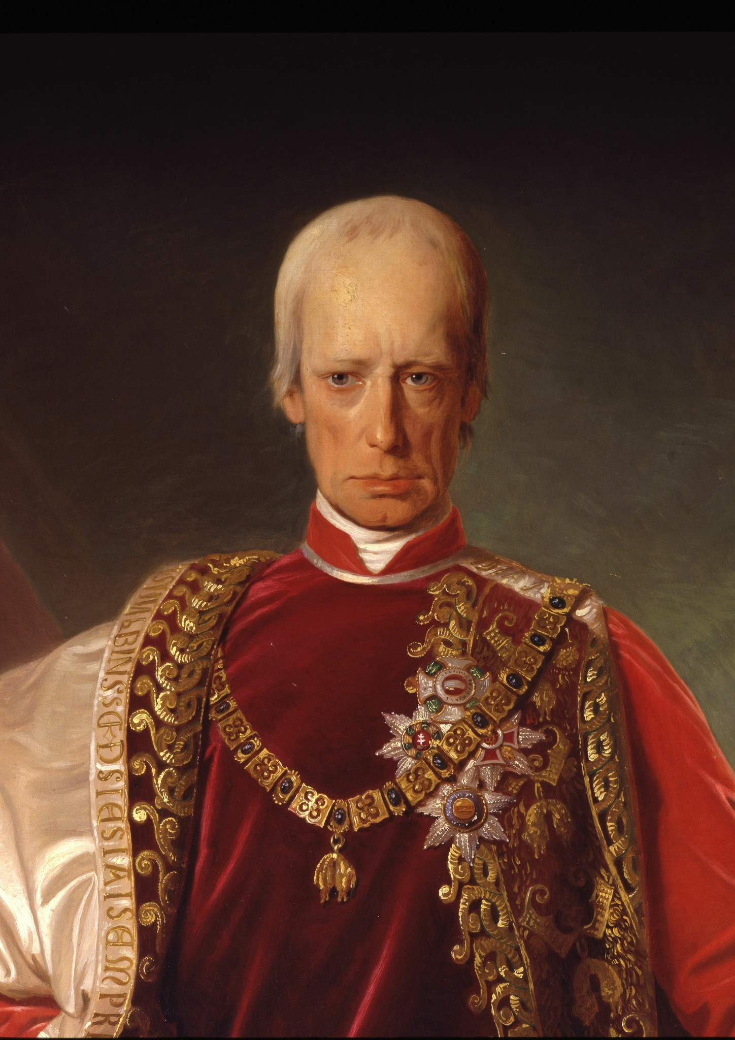 (detail)